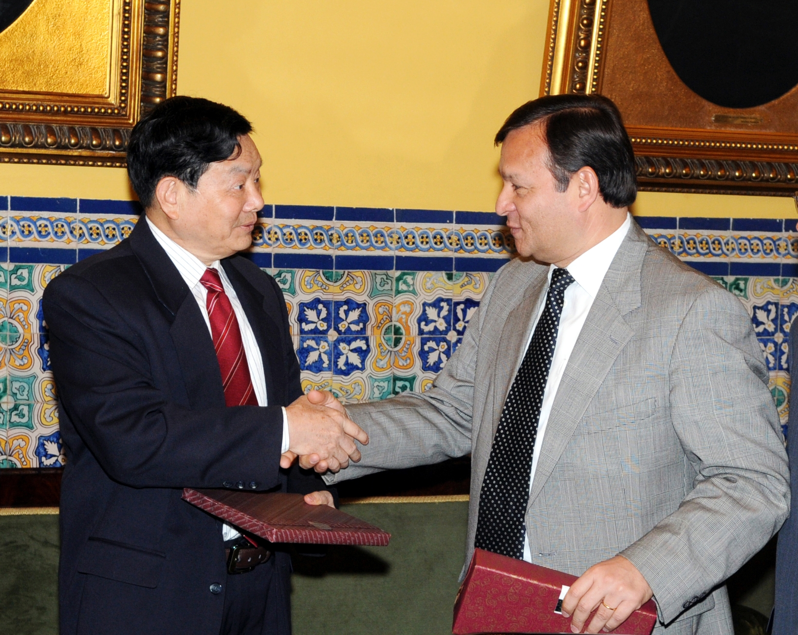 El Vicecanciller del Perú, Embajador Néstor Popolizio, se reunión con el Vicepresidente de la Comisión de Asuntos Exteriores del Comité Permanente de la Asamblea Popular Nacional de China, señor Liu Zhenwu